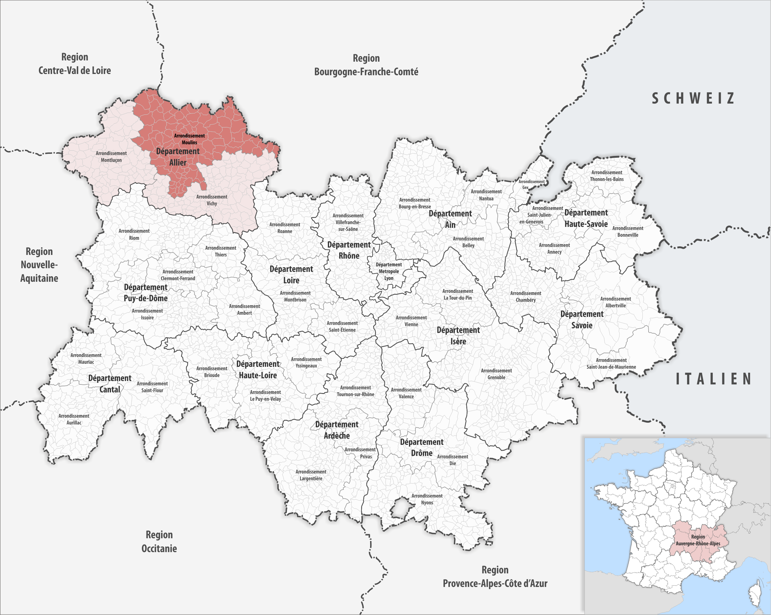 Lage des Arrondissements Moulins